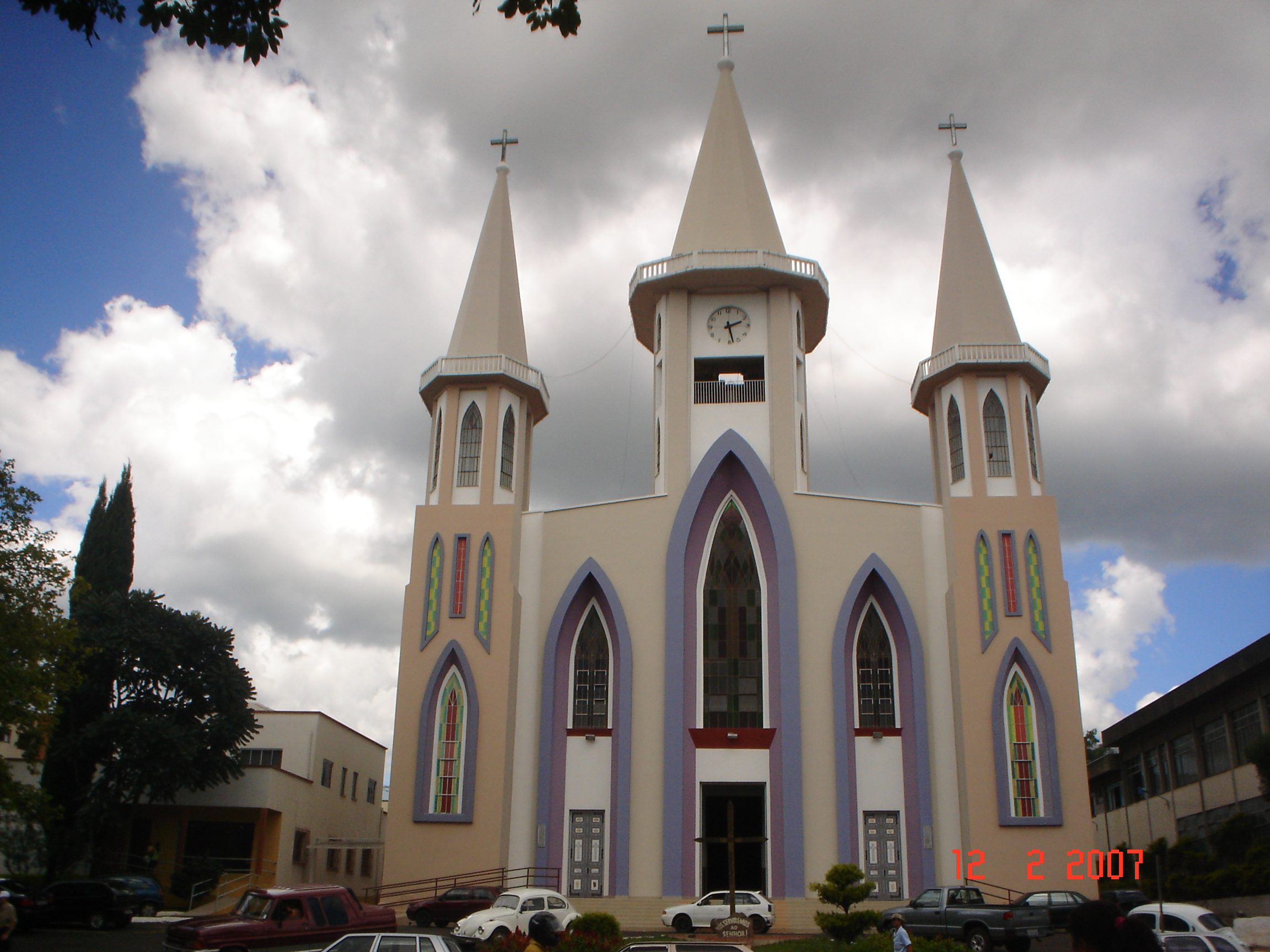 Igreja Central de Xanxerê, Santa Catarina, Brasil.